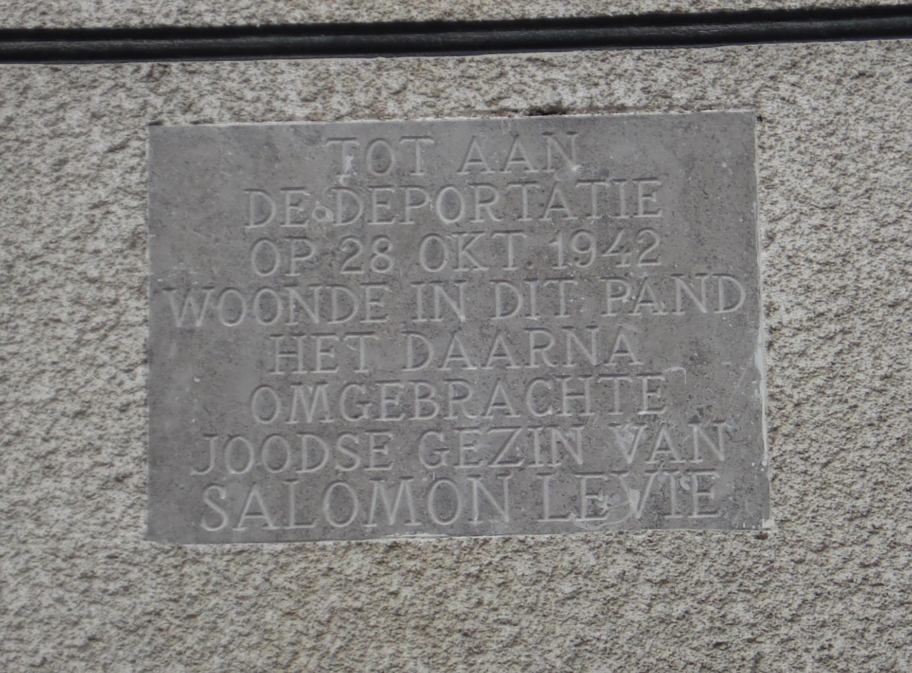 Spijkenisse, Voorstraat 14a. Monument "familie Levie". The Netherlands. The photographical reproduction of this work is covered under the article 18 of the Dutch copyright law, which states that “it is not an infringement of copyright to reproduce and publish pictures of a work, as meant in article 10, first paragraph, under 6°[1] or of an architectural work as meant in article 10, first paragraph, under 8°[2], which are made to be permanently located in a public place, as long as the work is depicted as it is located in the public space. Where incorporation of a work in a compilation is concerned, not more than a few of the works of the same author may be included”. [1] drawings, paintings, works of architecture and sculpture, lithographs, engravings and the likes [2] drafts, sketches and three-dimensional works relating to architecture, geography, topography or other sciences Note that photographs are not included in Item 6. They are separately listed at Item 9 and are therefore not covered by FOP. See COM:CRT/Netherlands#Freedom of panorama for more information. .